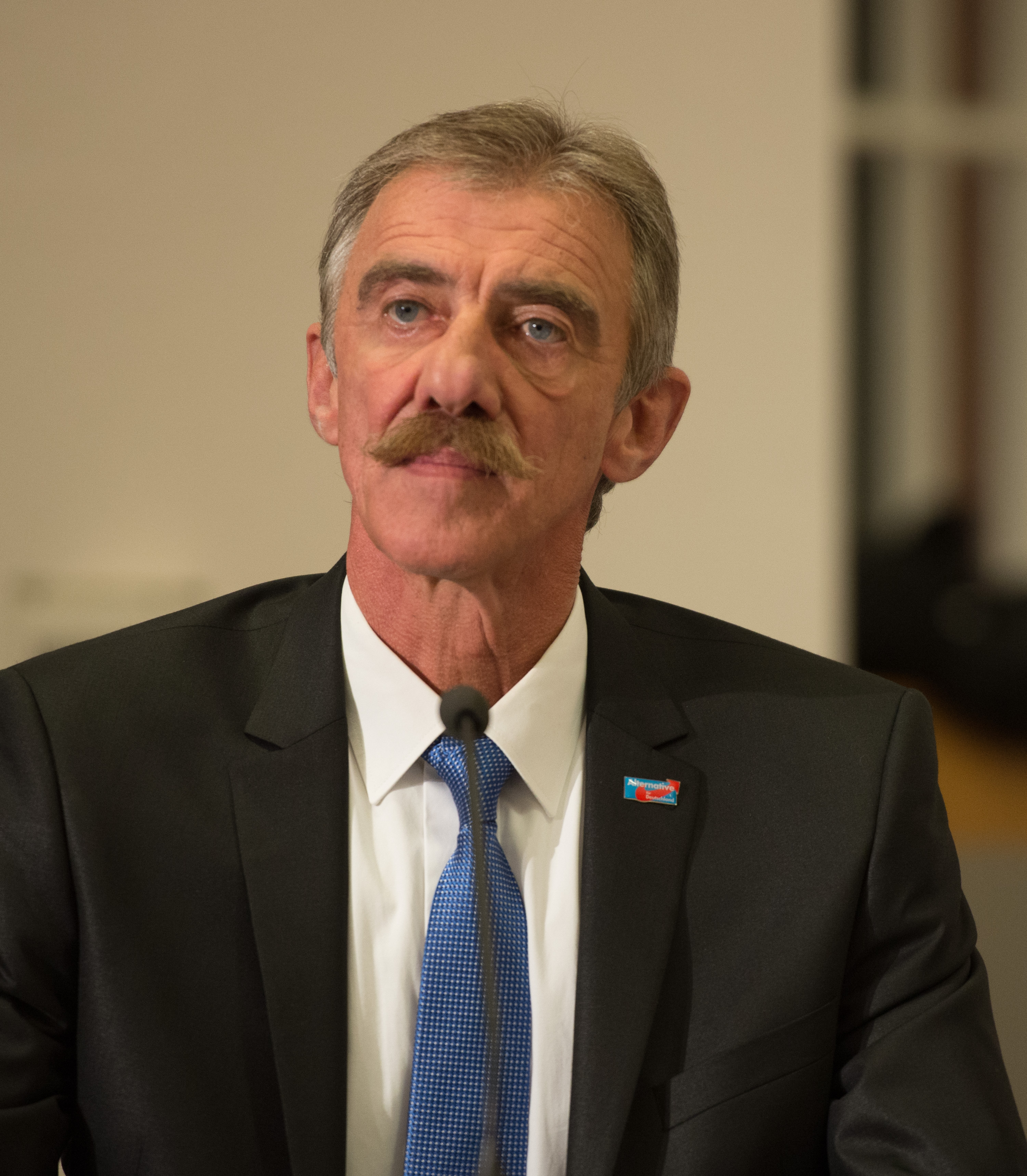 Landespressekonferenz mit den Spitzenkandidaten am Abend der Landtagswahl in Rheinland-Pfalz am 13. März 2016 im Landesmuseum